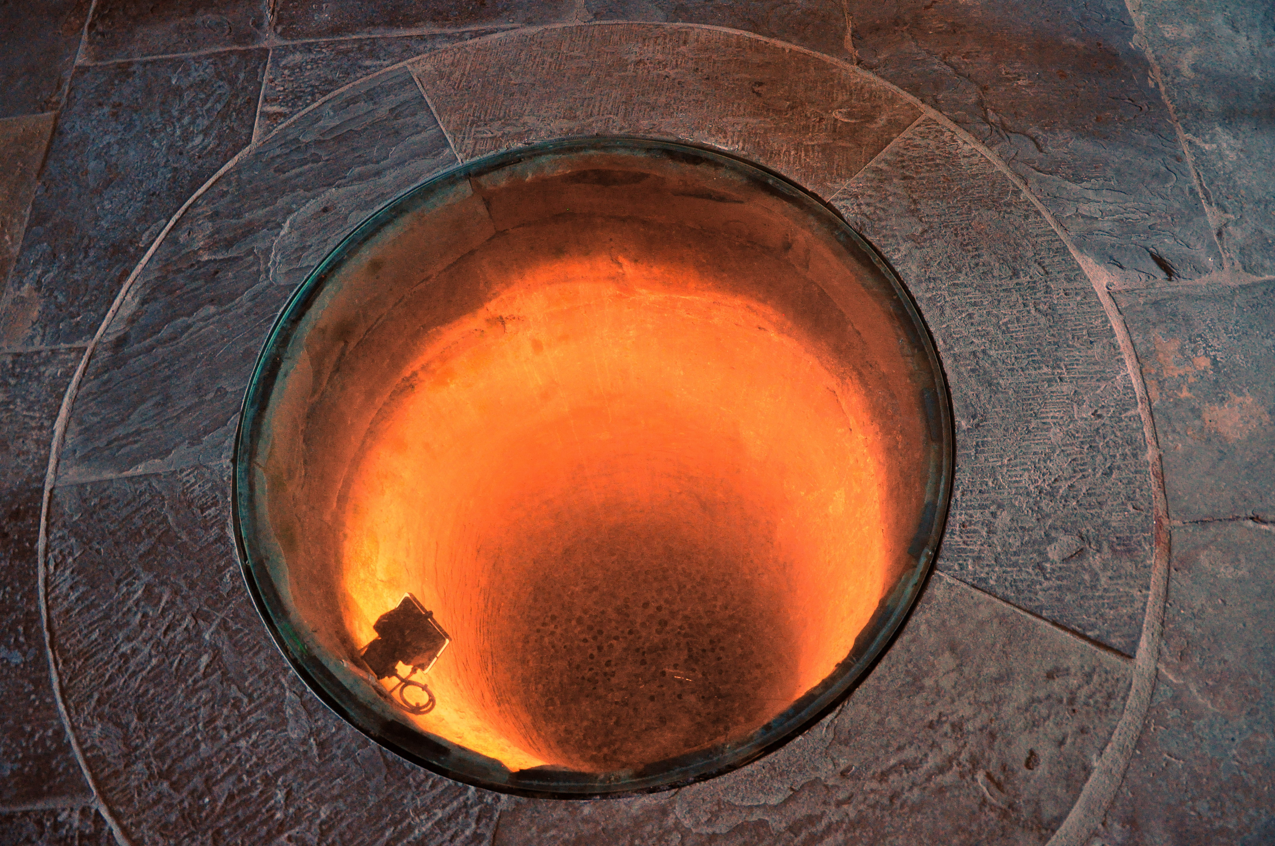 Schloss in Greifensee (Switzerland)